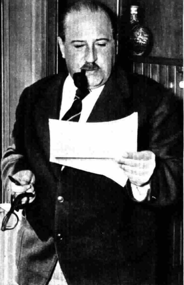 Gino Capriolo, commediografo italiano.